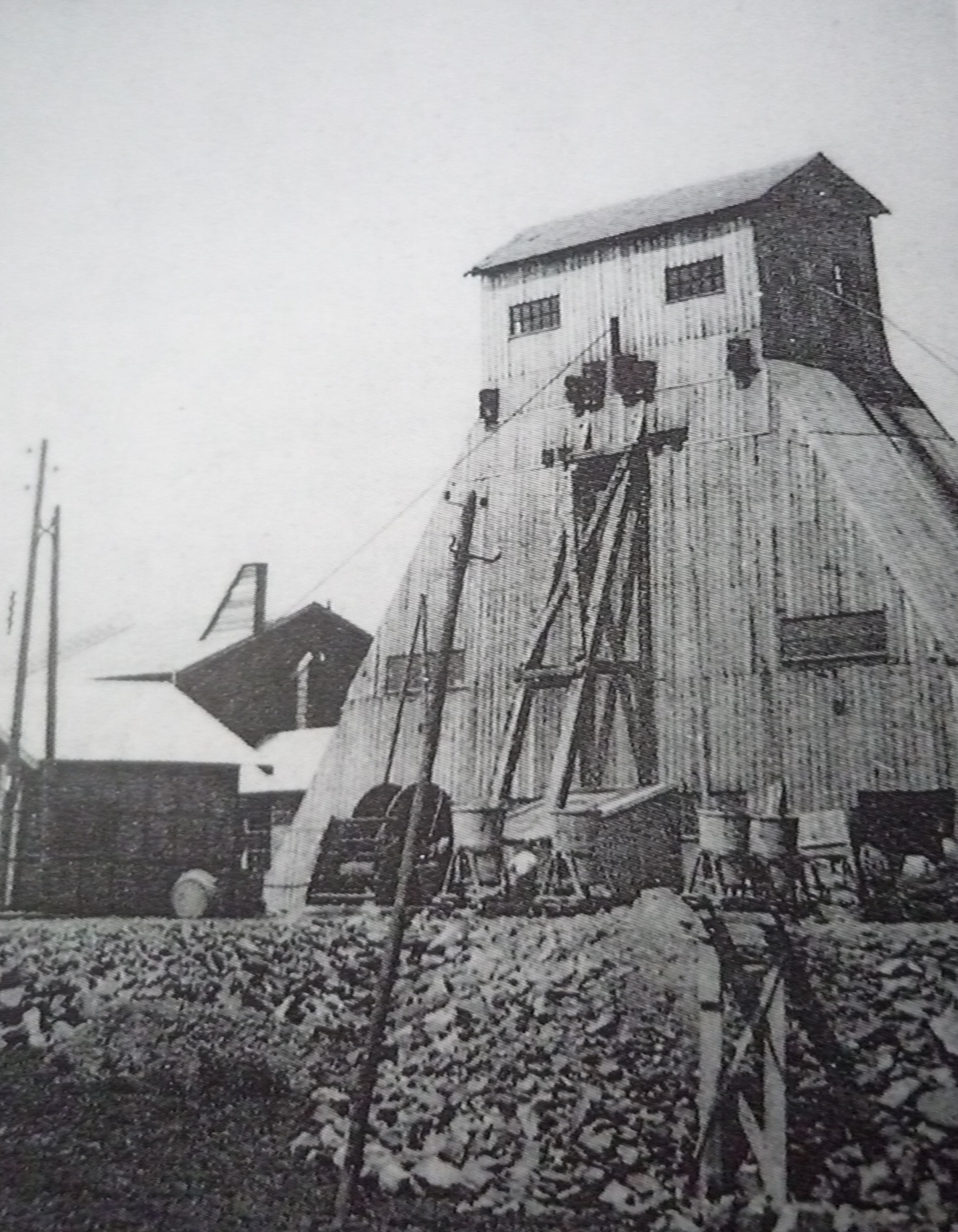 La Fosse n° 1 - 1 bis de la Compagnie des mines de Gouy-Servins et Fresnicourt Réunis était un charbonnage constitué de deux puits situé à Bouvigny-Boyeffles, Pas-de-Calais, Nord-Pas-de-Calais, France. À priori, il s'agit du puits n° 1 bis.